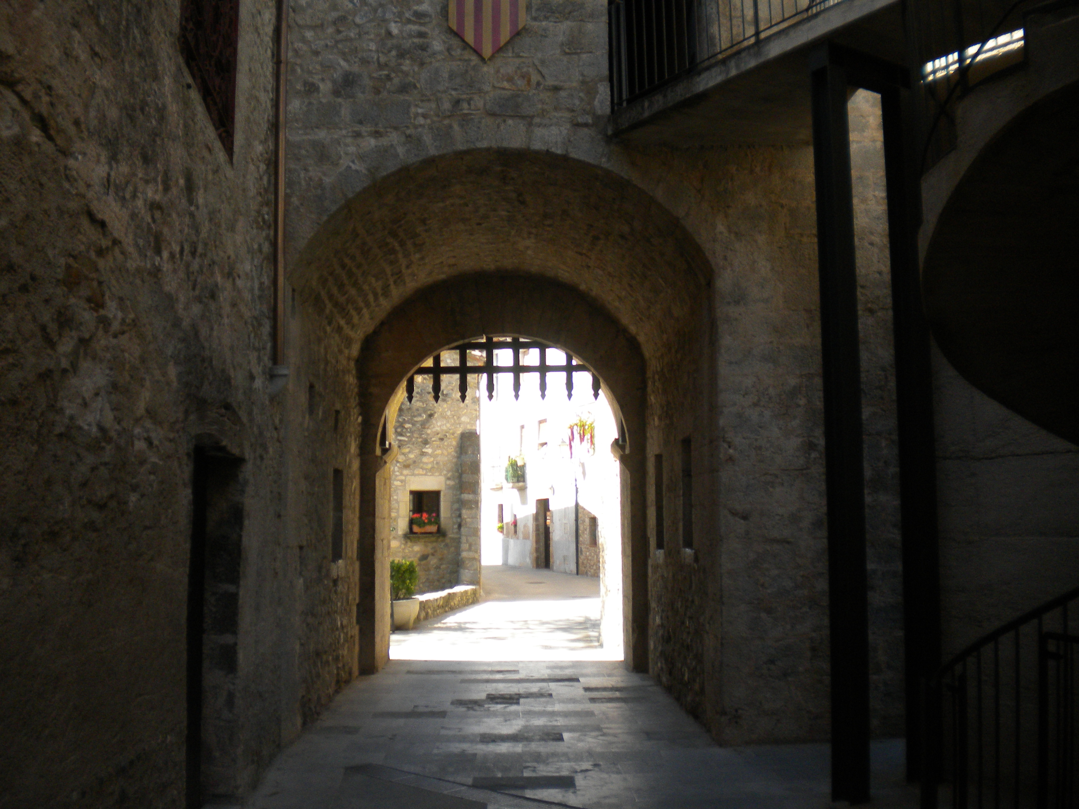 Vista interior del portal de la muralla de Sant Llorenç de la Muga, a l'Alt Empordà.